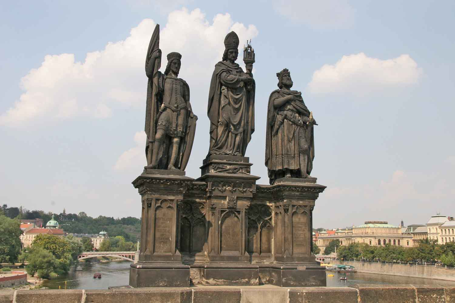 Česky: Sousoší Svatého Norberta, Václava a Zikmunda na Karlově mostě